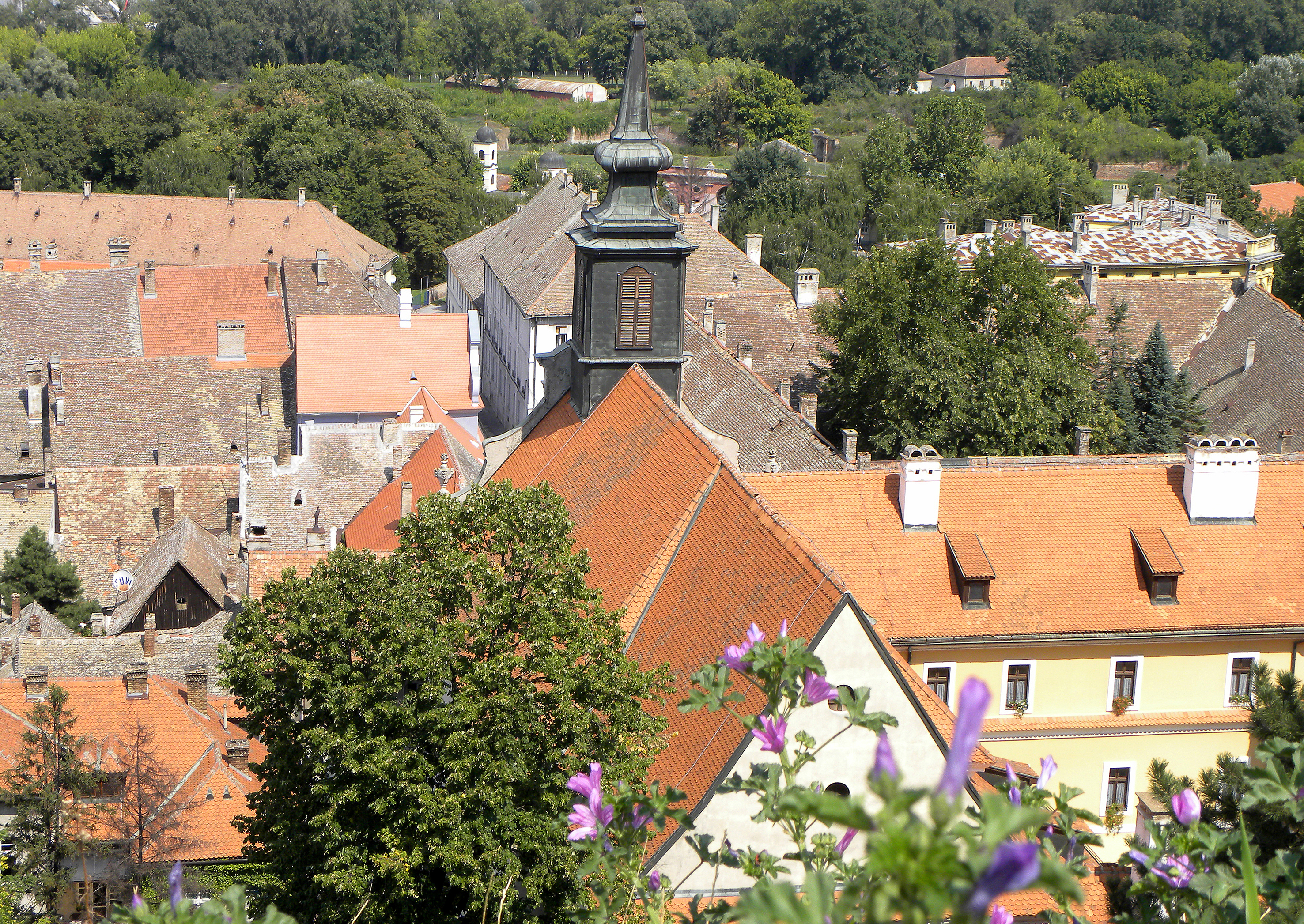 Petrovaradin